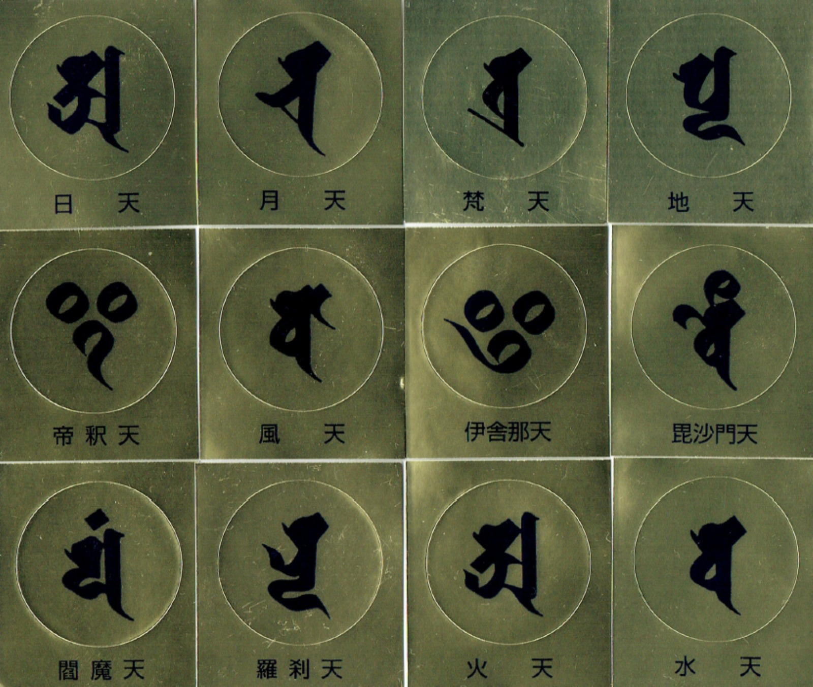 最明寺のシール